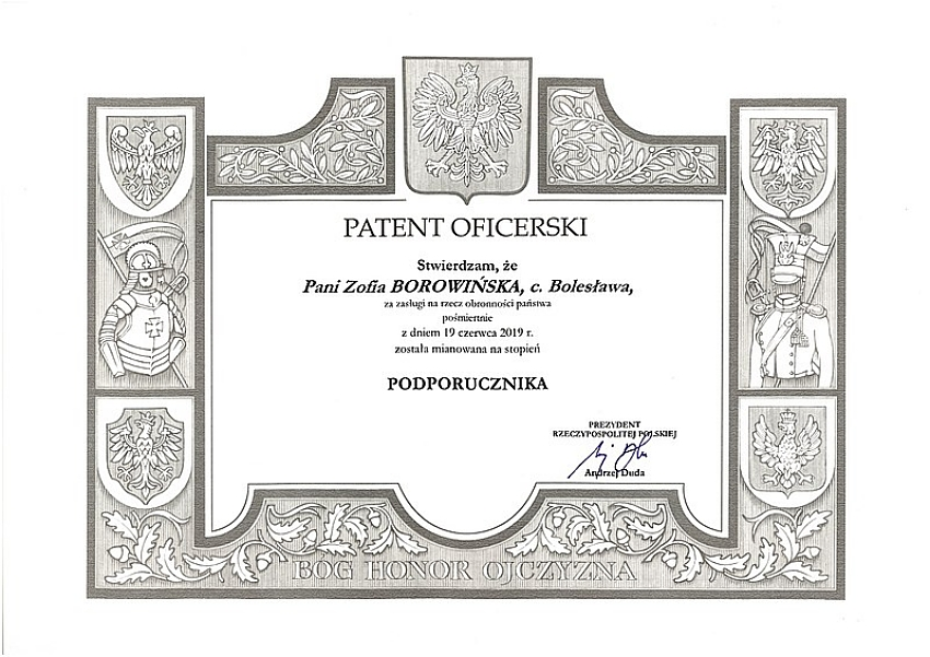 Akt pośmiertnego mianowania Katarzyny Zofii Borowińskiej na wyższy stopień wojskowy podporucznika w formie patentu oficerskiego.